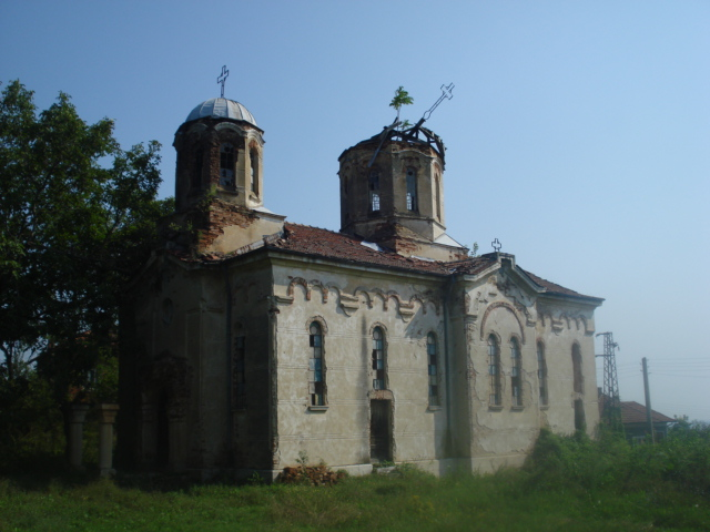 Църквата "Света Богородица" в с. Тлачене